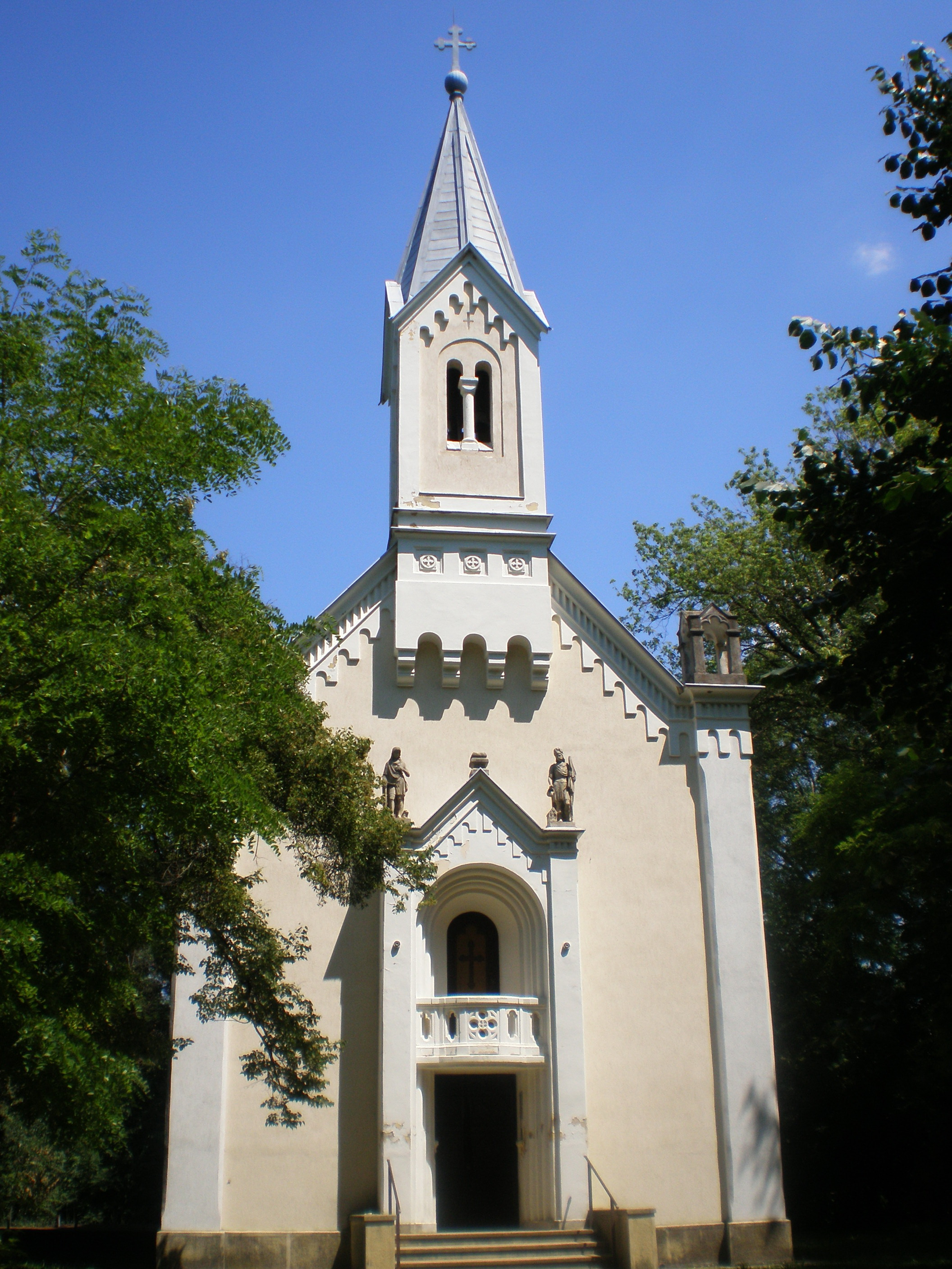 Sarlós Boldogasszony-kegykápolna Máriakálnokon (Győr-Moson-Sopron megye, Magyarország)